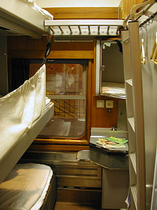 Sovvagnskupé av standardmodell.